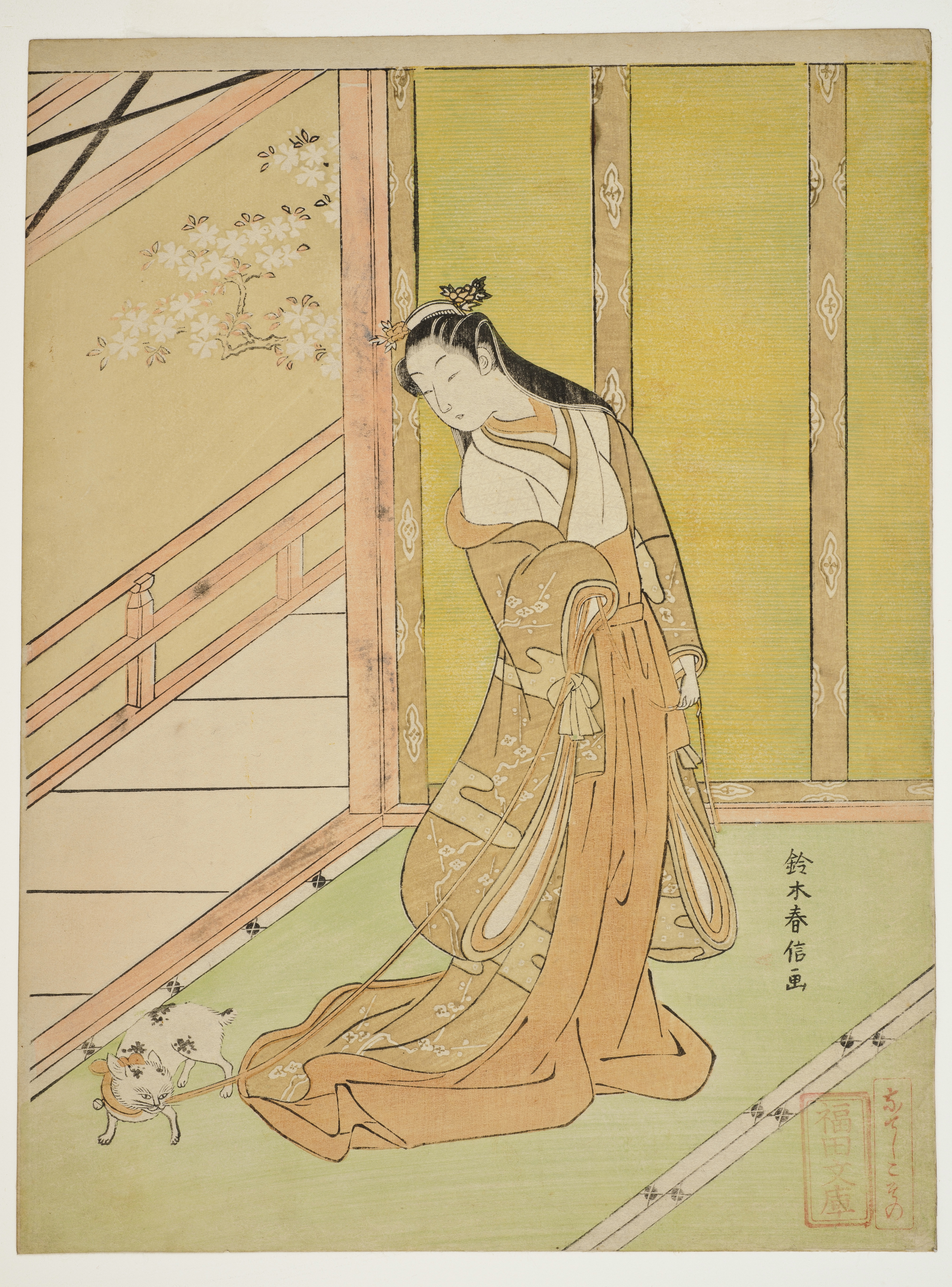 Prinzessin Sannomiya, die dritte Prinzessin aus der «Geschichte vom Prinzen Genji». 28.7 x 21.7 cm Geschenk James A. Michener, 1991. Honolulu Museum of Art (21737)